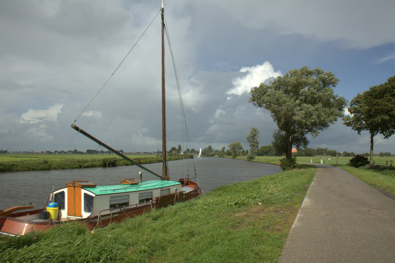 Domwier een buurtschap van Wergae (Warga) aan de Wergasterfeart.